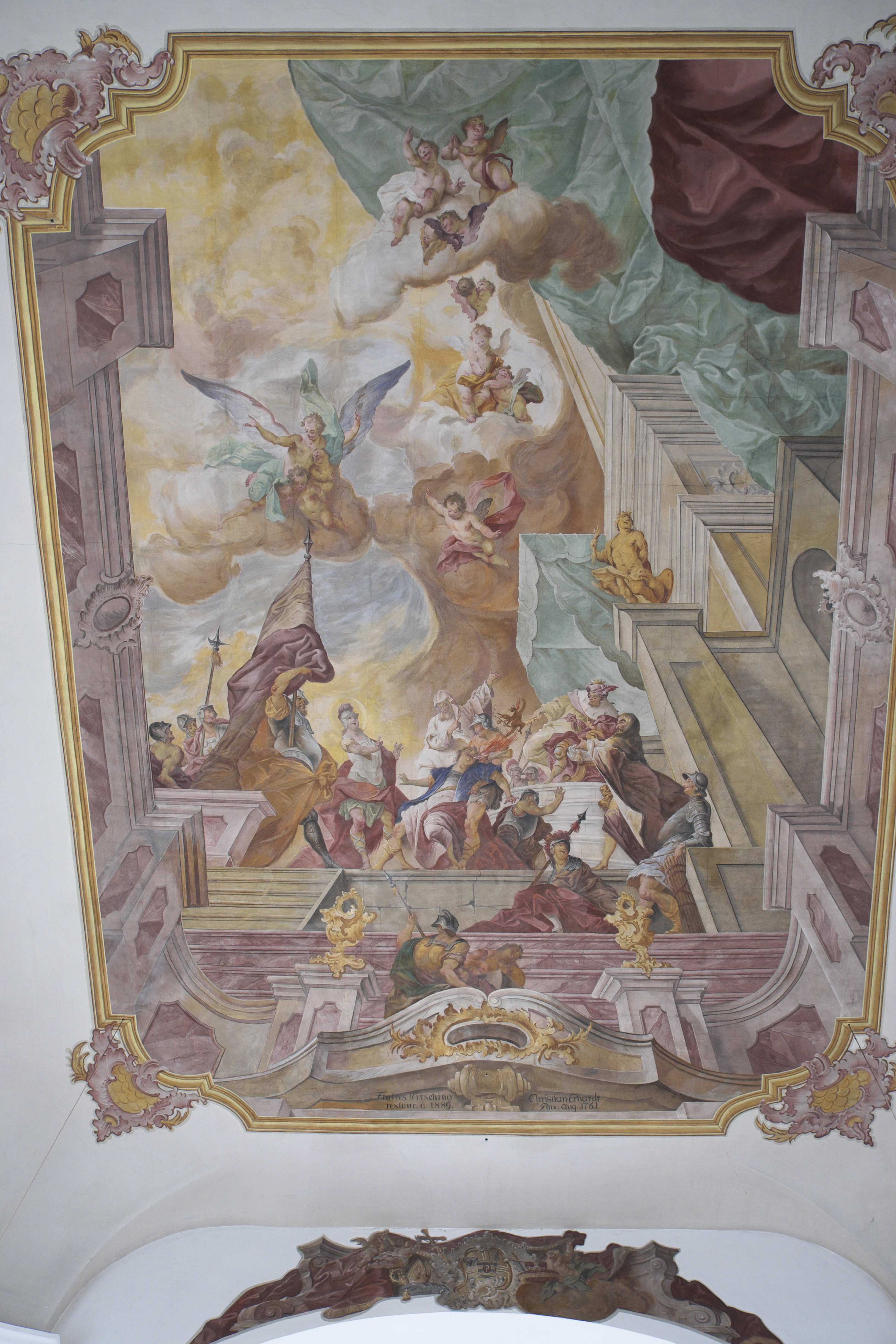 Katholische Pfarrkirche St. Vitus in Kottingwörth (Beilngries) im oberbayerischen Landkreis Eichstätt (Bayern/Deutschland), Deckenmalerei im Langhaus von Christian Dominikus Erhardt, von 1761, mit Signatur (unten)